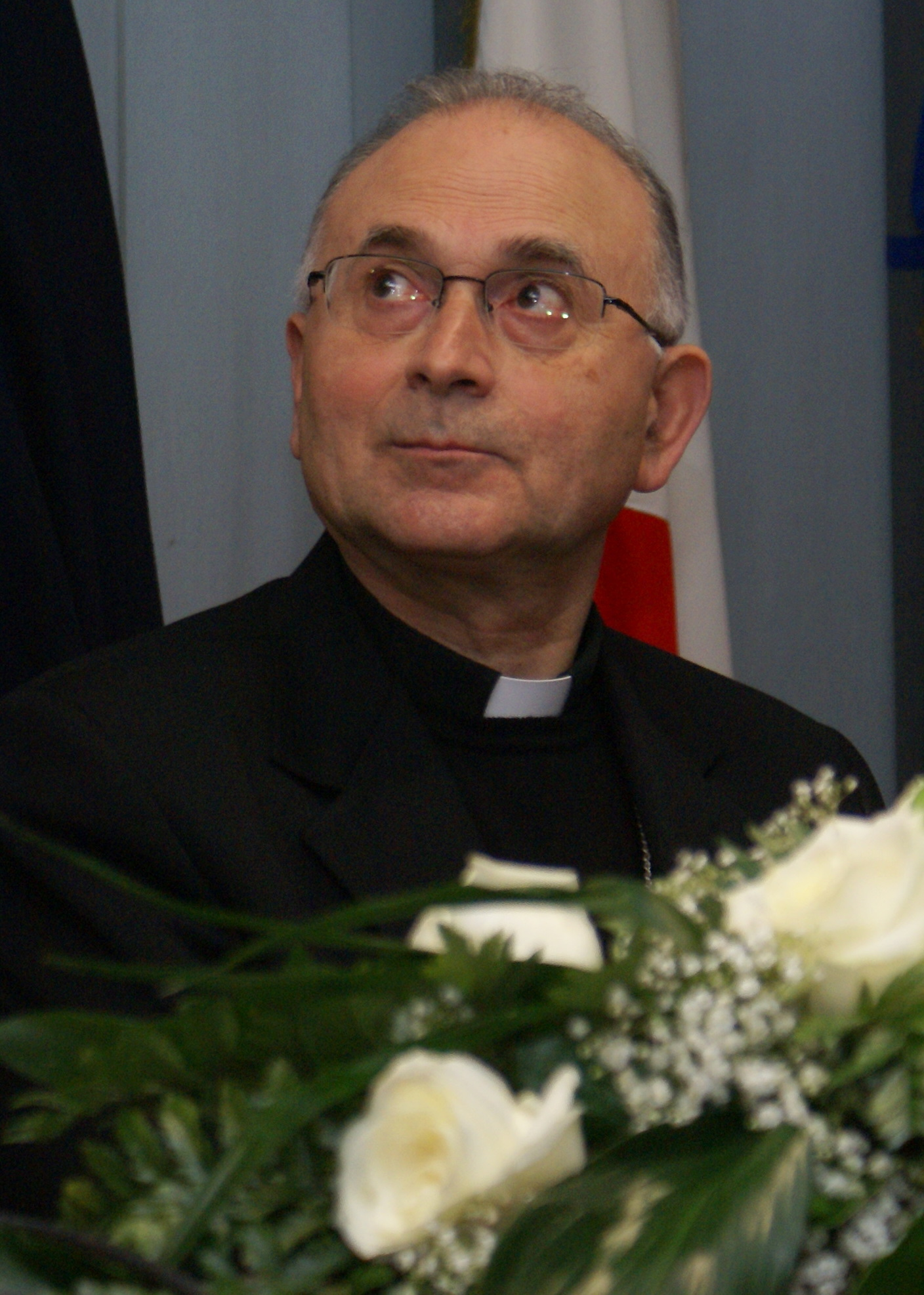 Monsignor Italo Castellani, Arcivescovo di Lucca